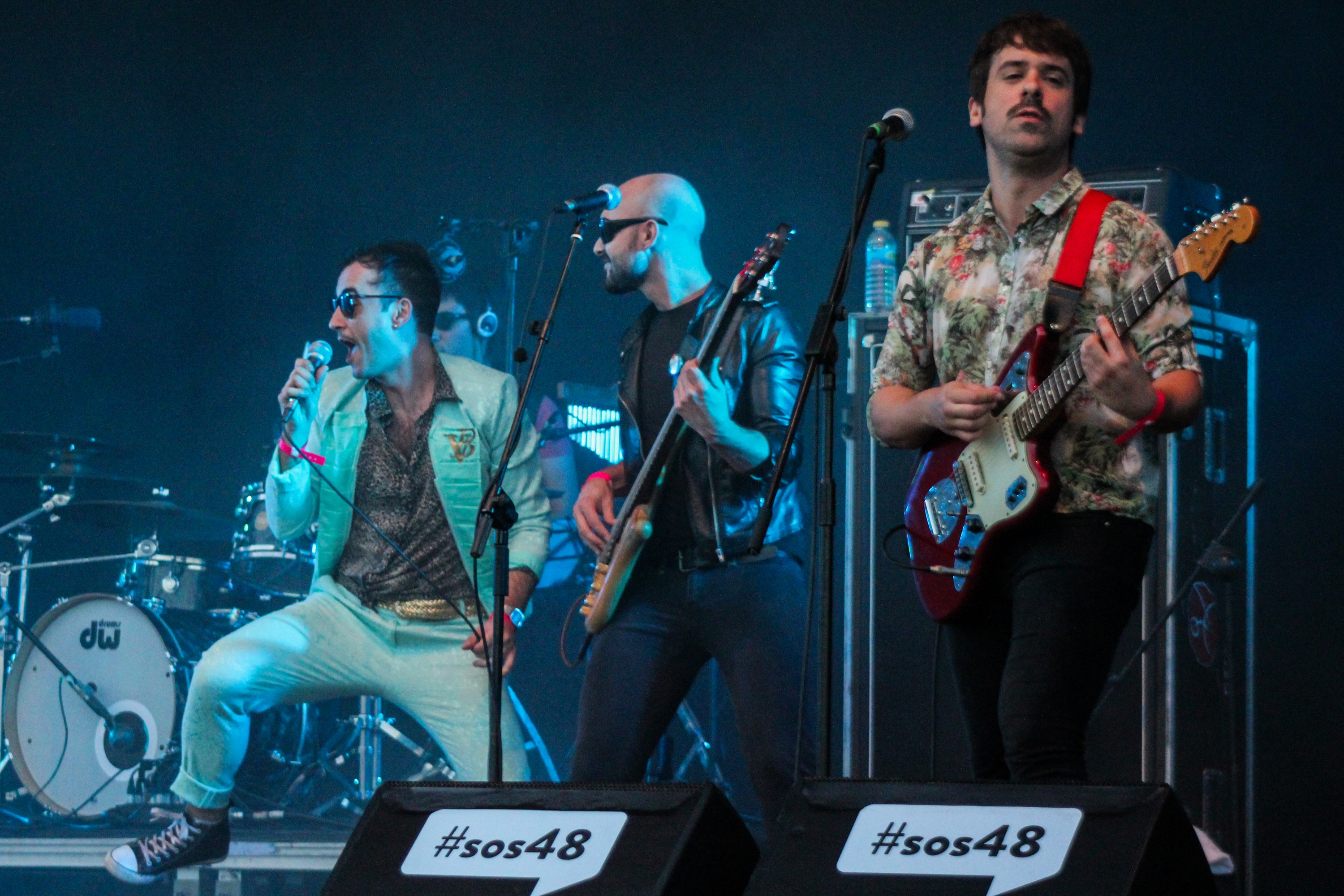 Varry Brava es un grupo de indie pop creado en Murcia en el año 2009. Está formado por los oriolanos Óscar Ferrer (vocalista), Aarön Sáez (guitarra y teclados) y Vicente Illescas (guitarra).